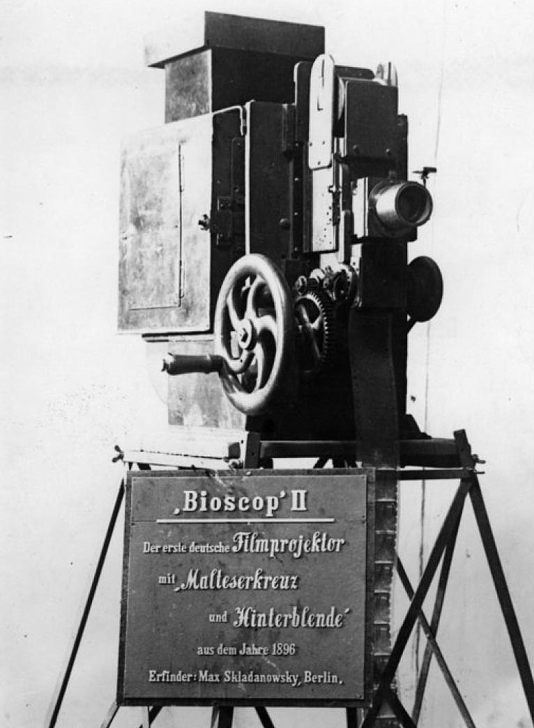 Max Skladanowskys "Bioscop" war ein Projektionsapparat nach dem Duplex-Verfahren, der 54-mm-Film mit zwei Filmschleifen verwendete.